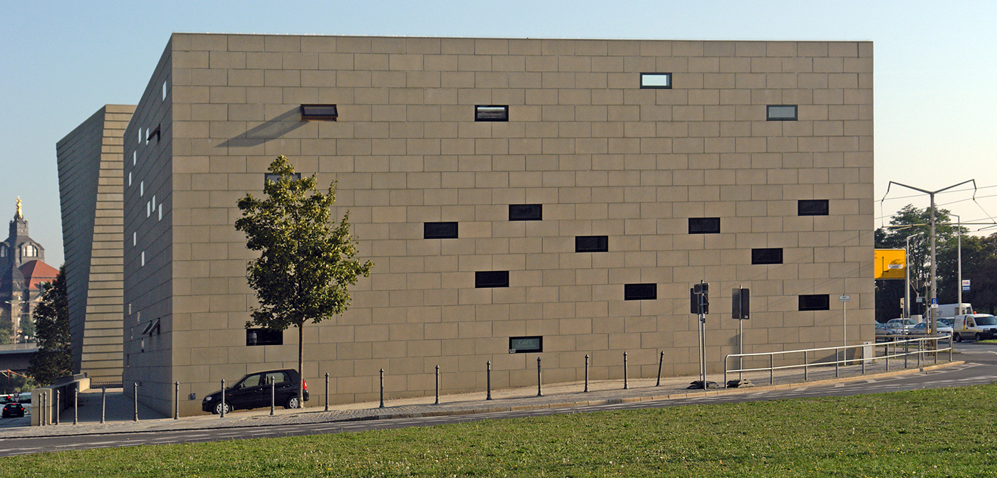 Dresden, Synagoge